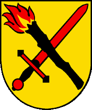 Wappen von Patzen-Fardün Kanton Graubünden Schweiz